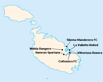 Répartition des clubs en First Division Maltaise 1914-1915.